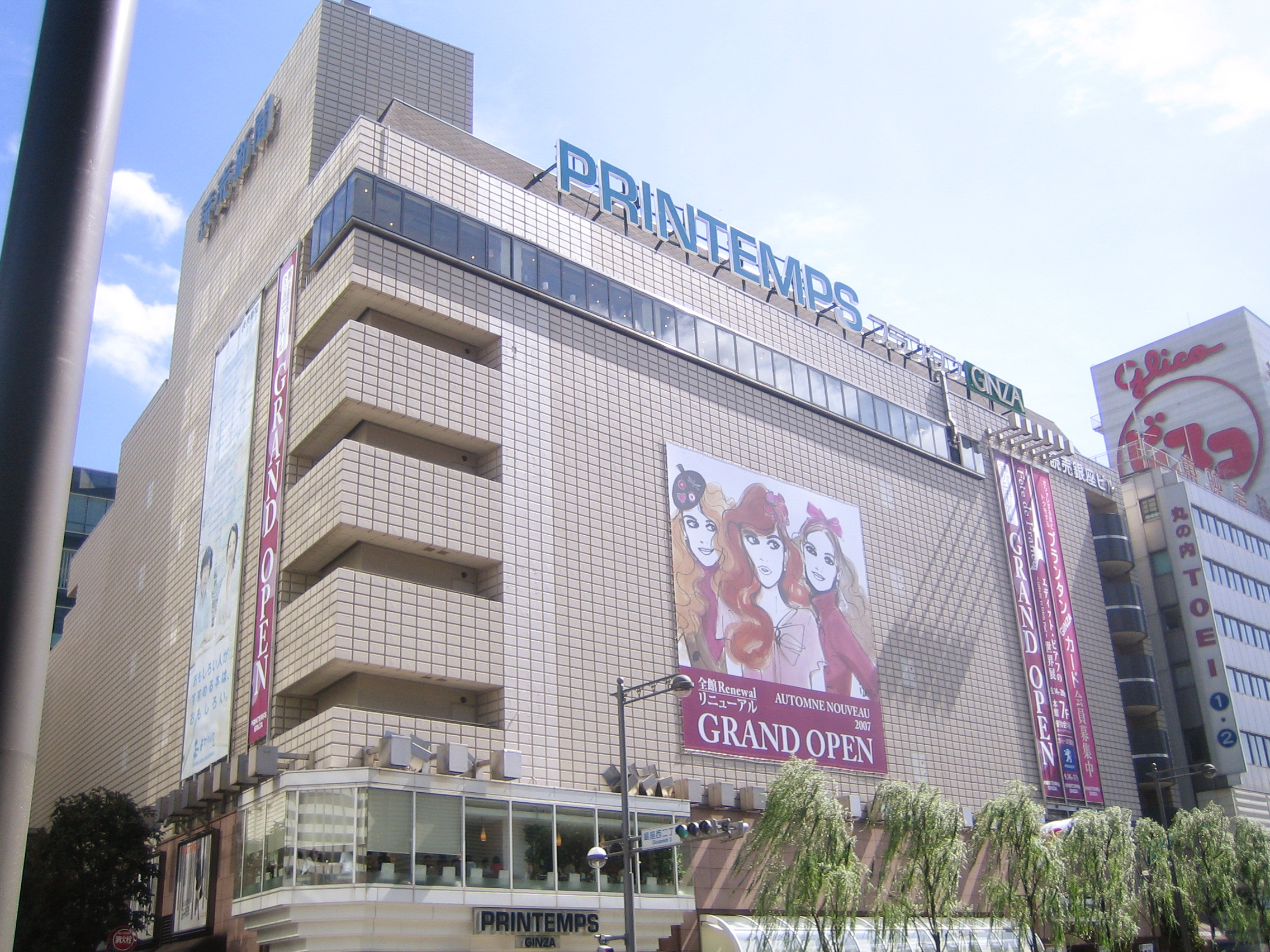 プランタン銀座。東京都中央区銀座 Printemnps Ginza (プランタン銀座), at Ginza, Chuo, Tokyo, Japan